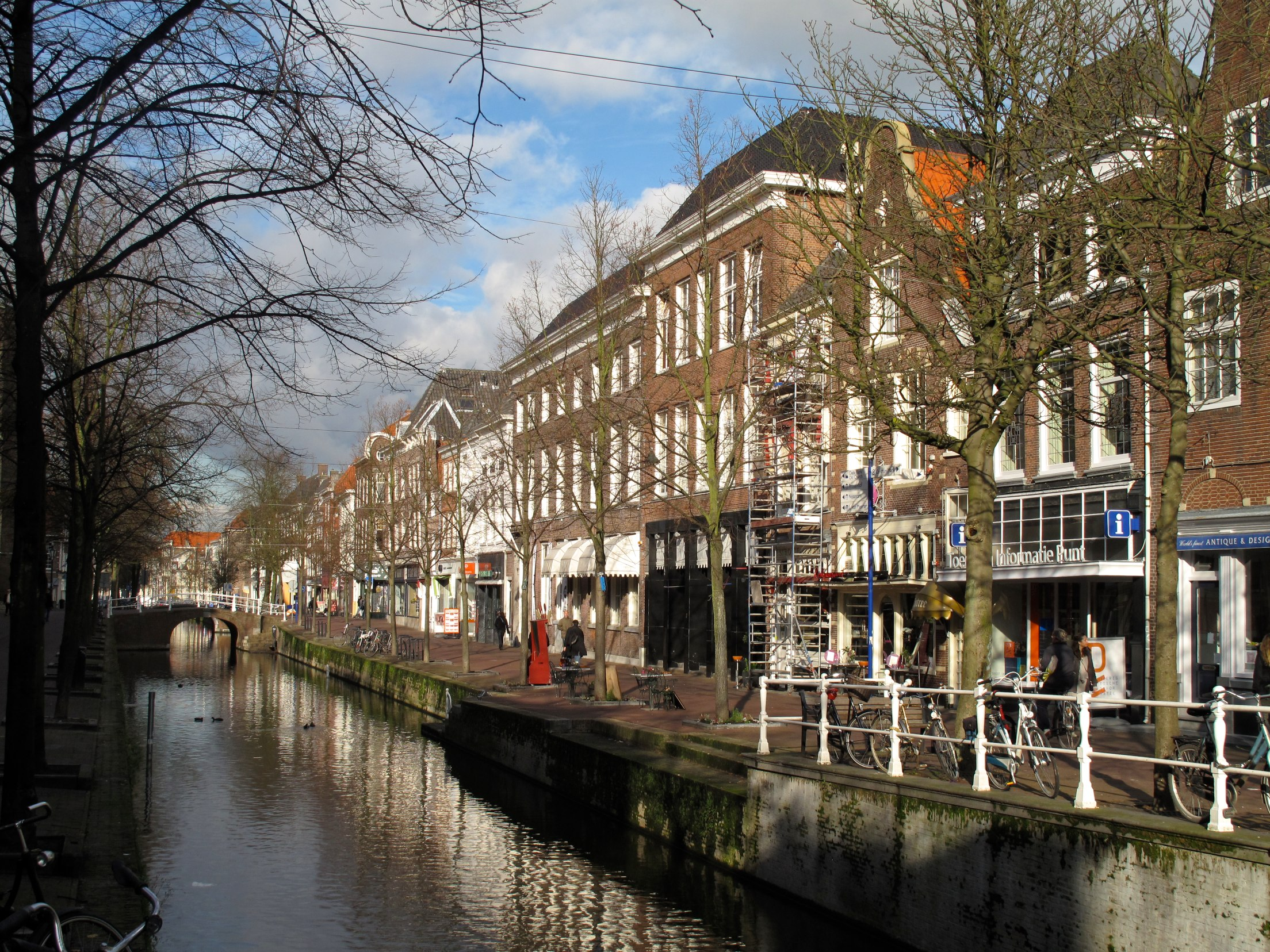 quartier à 30